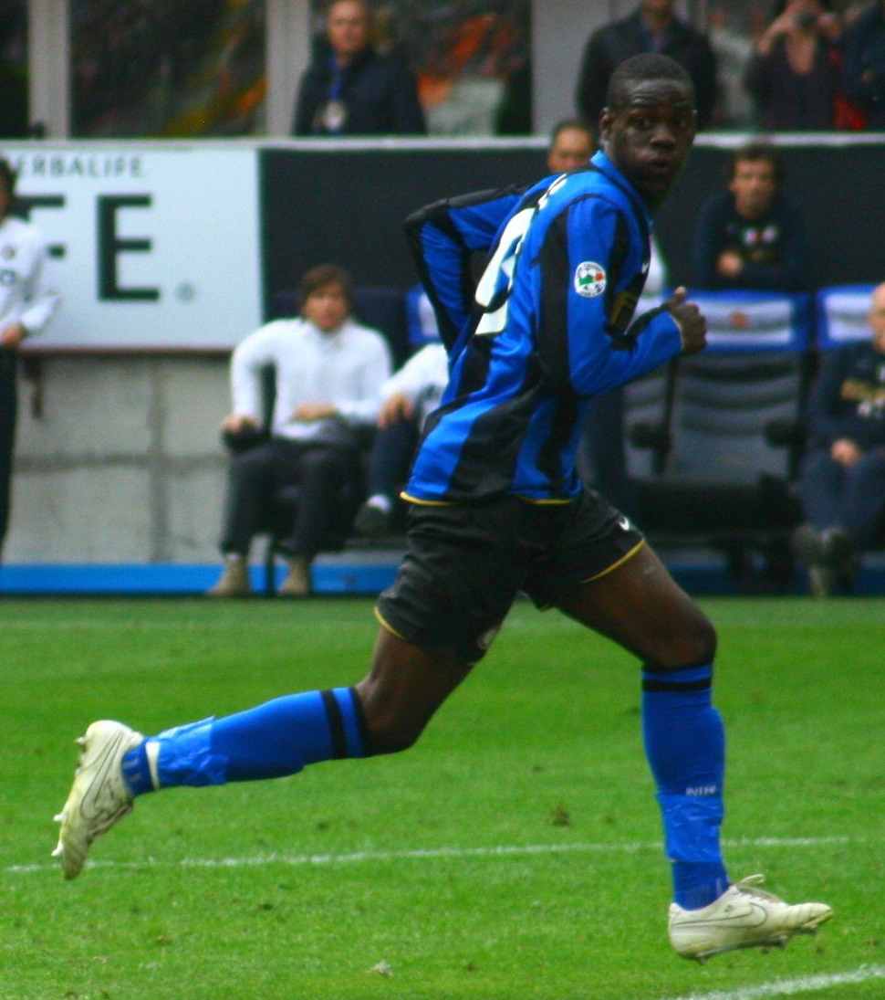 Mario Balotelli, player of italian football team Inter Milan